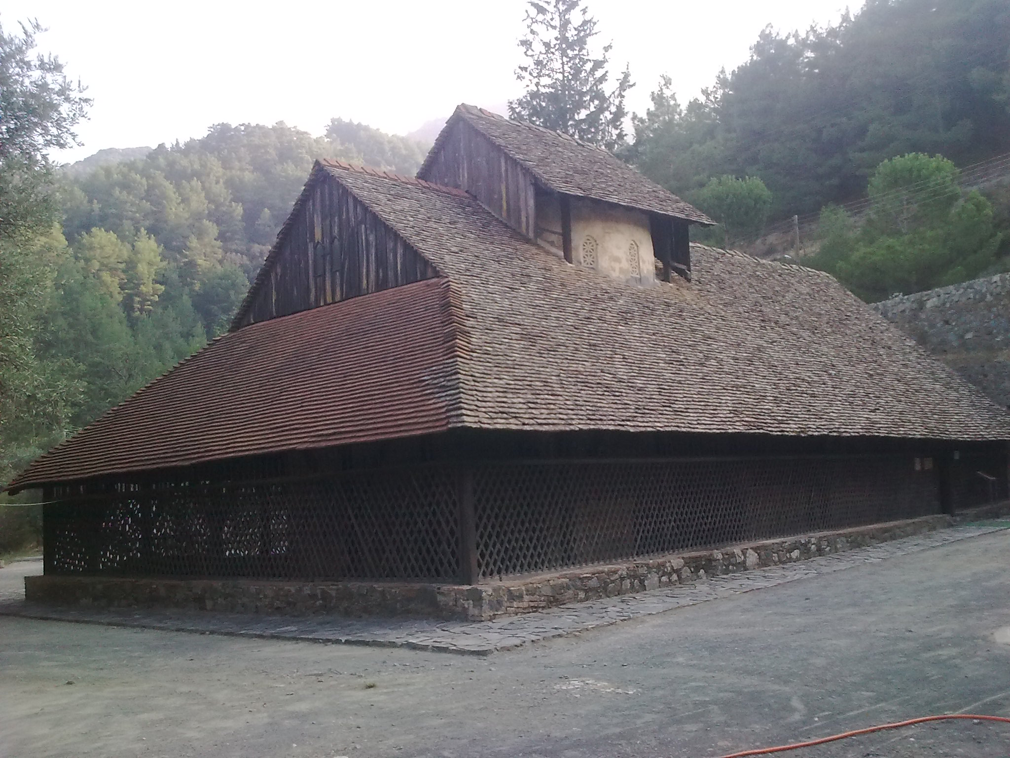 παναγια του Αρακα